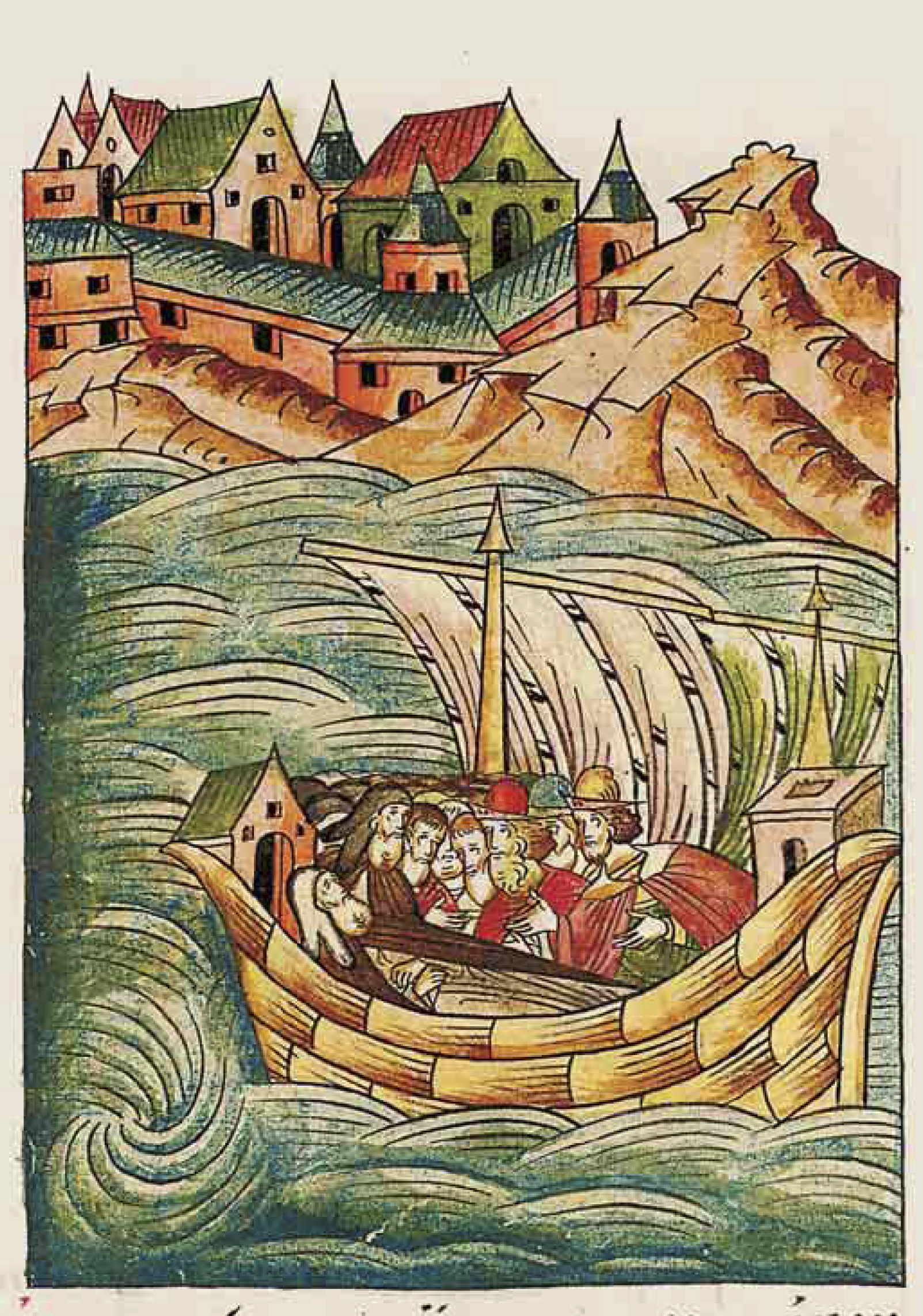 ЛИЦЕВОЙ ЛЕТОПИСНЫЙ СВОД И плыли они по морю, уже переплыли все морские пространства и были уже у берегов Царьграда, видели, что вблизи Царьград, как внезапно Митяй разболелся и умер на корабле.